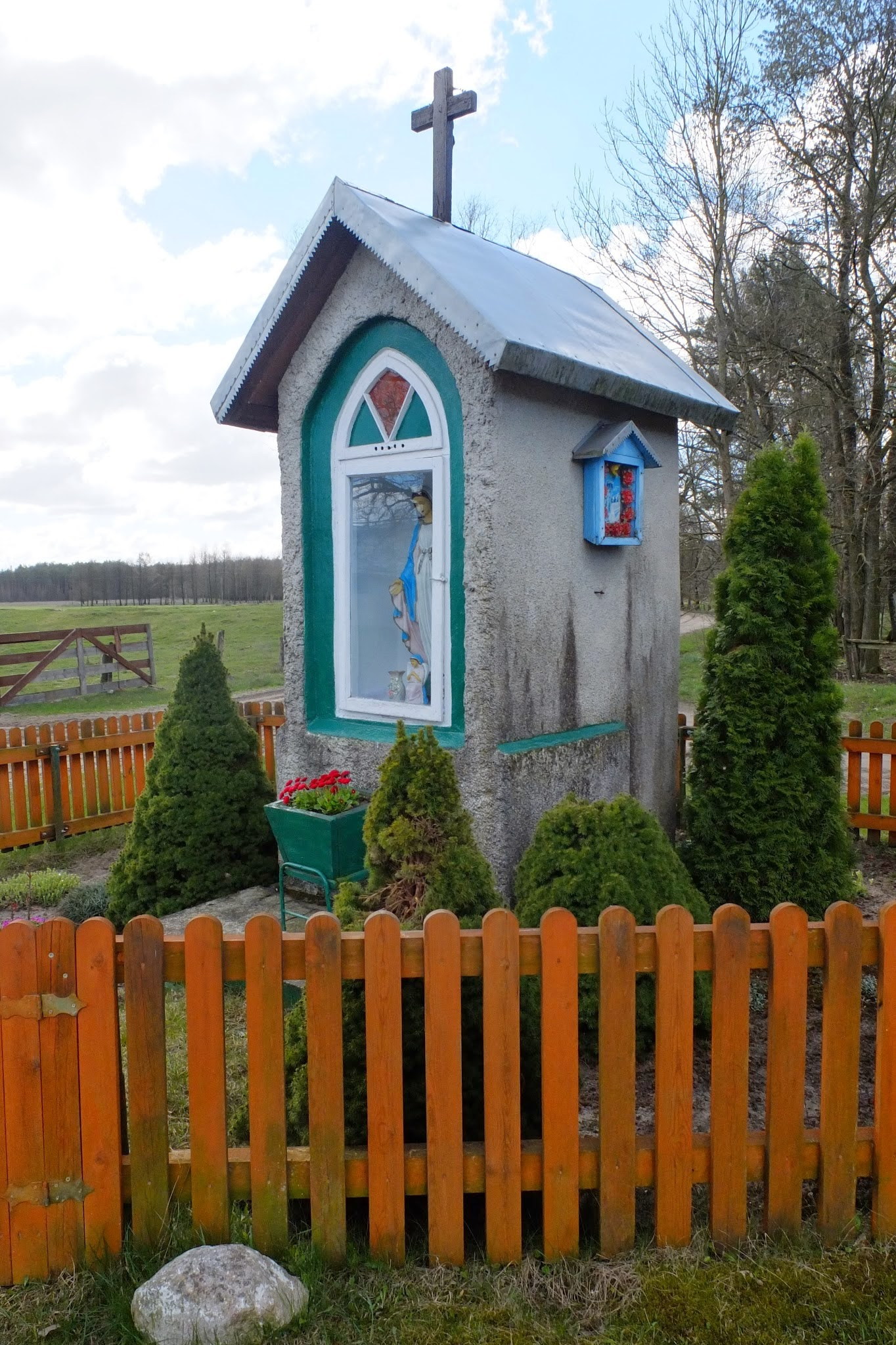 Pużary, kapliczka przydrożna wzniesiona po 1945 r.